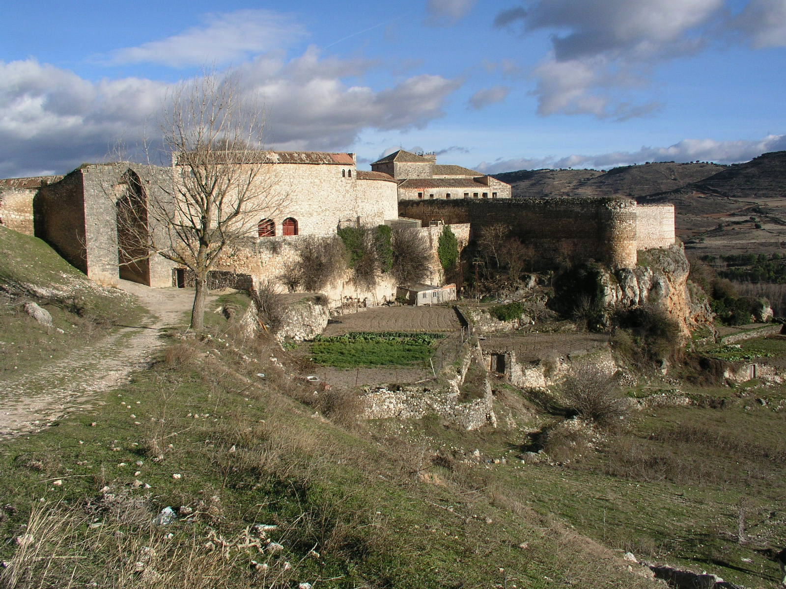 Brihuega, Arco de Cozagón, Provincia de Guadalajara, Spain